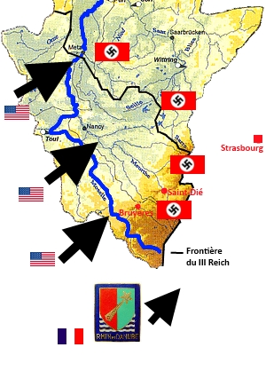 Progression Nord-Est des troupes américaines après 29/09/1944